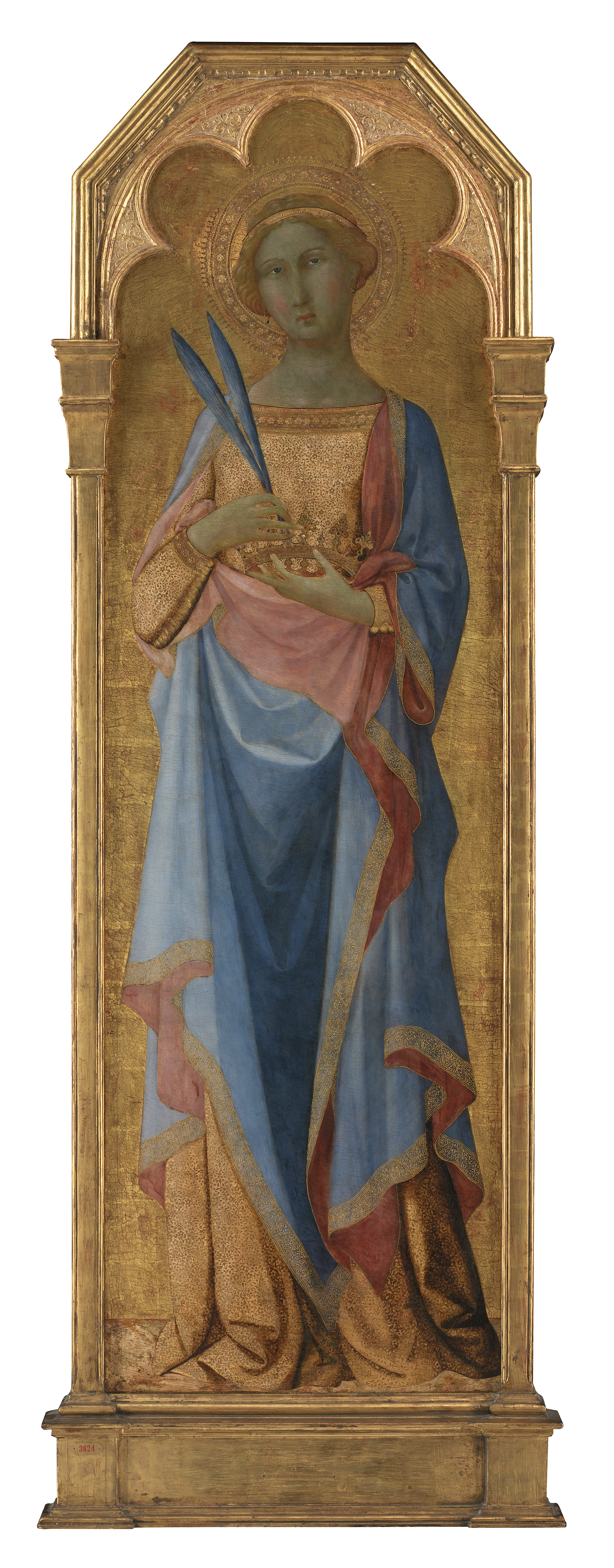 Santa Corona af Mesteren for Palazzo Venezia-madonnaen (ca. 1340-60), del af altertavle